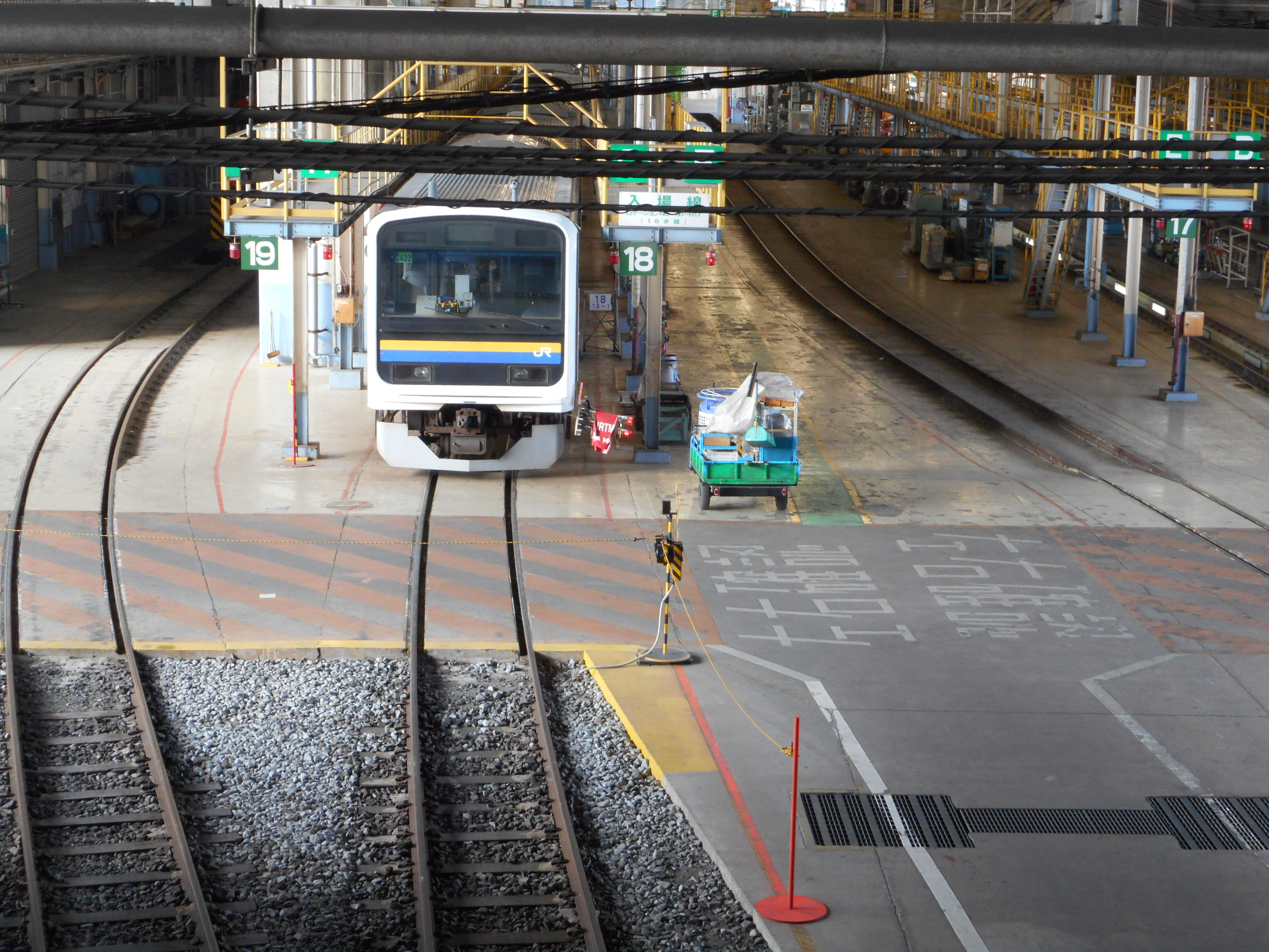 大宮総合車両センター入出場・艤装棟の入場線（幕張車両センター所属の209系C432編成が入場中）－大宮駅北側陸橋（大栄橋）より撮影